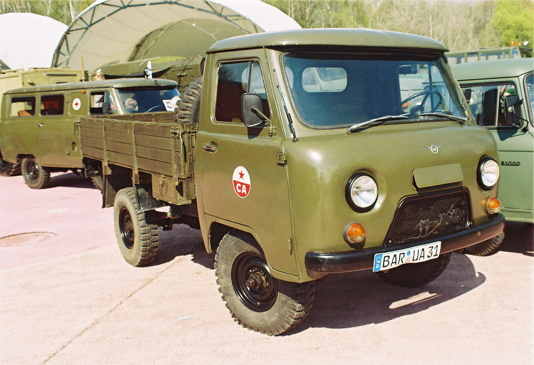 UAZ 452 Kamera: *EXA Rheinmetall (Baujahr 1952) mit Meyer Optik Görlitz 3,5/35